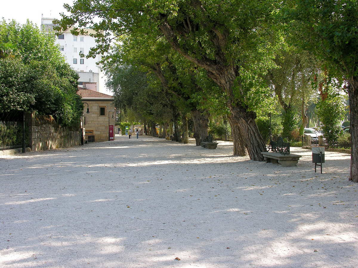 Cambados, Galicia, España Publish by= Luis Miguel Bugallo Sánchez. Self made.